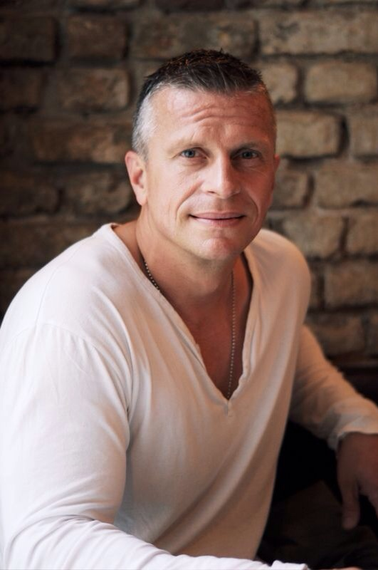 Schauspieler, Anti-Gewalt-Experte, Autor